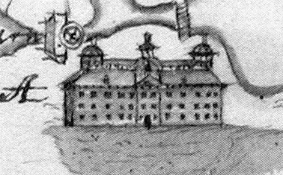 Nynäs huvudbyggnad 1685